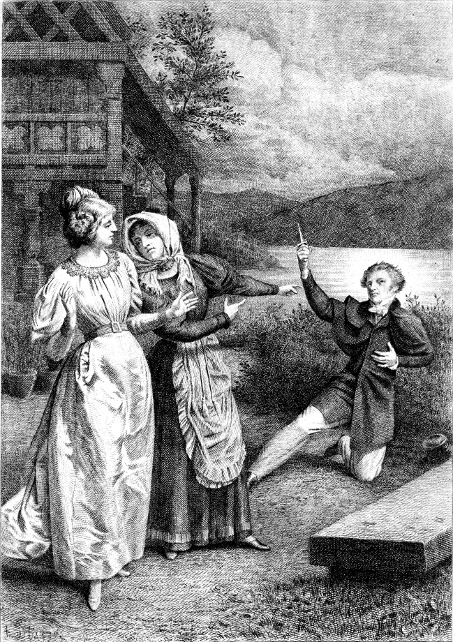 Title page of Honoré de Balzac's The Vendetta (1830).